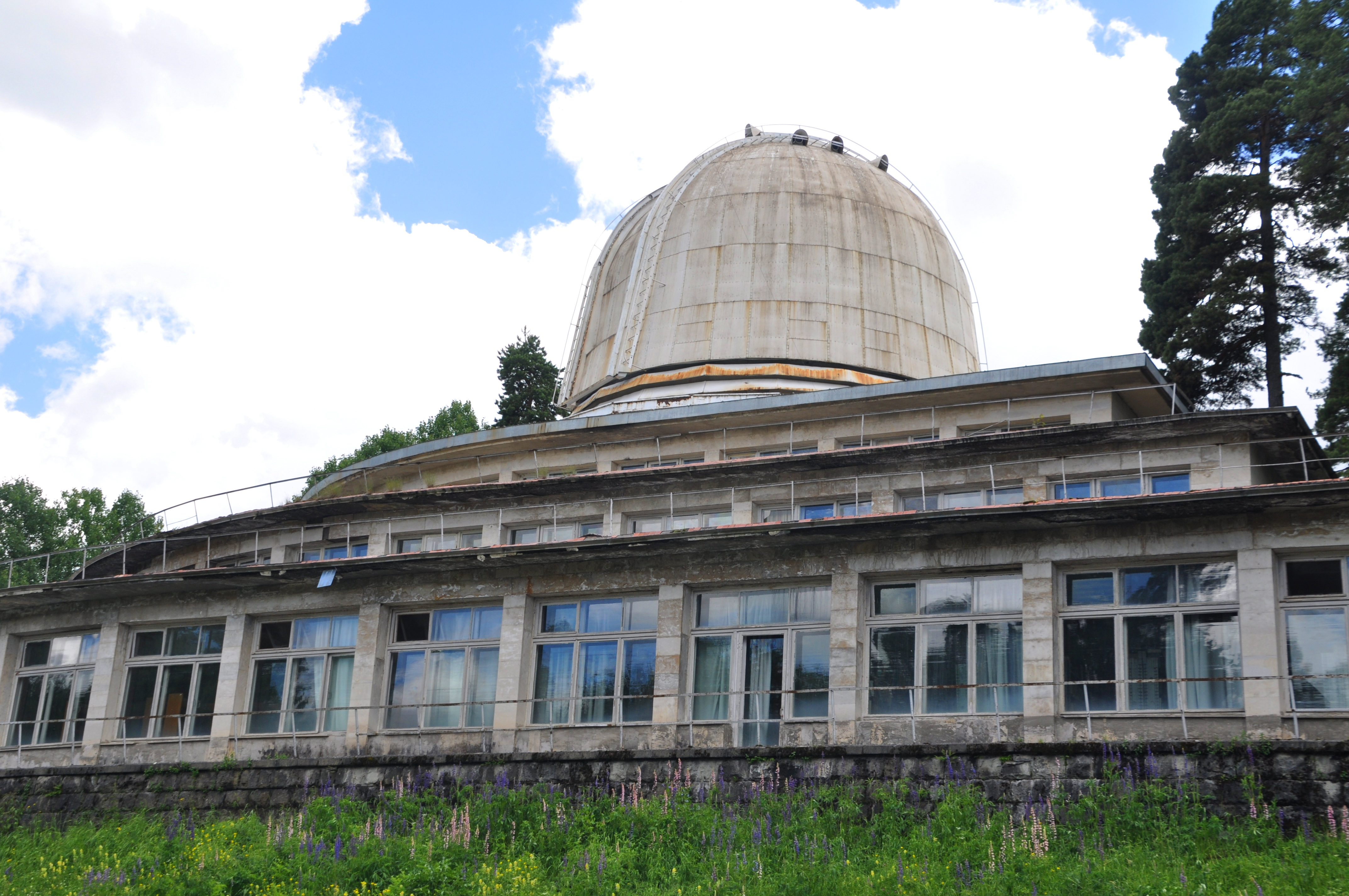 18495 Abastumani